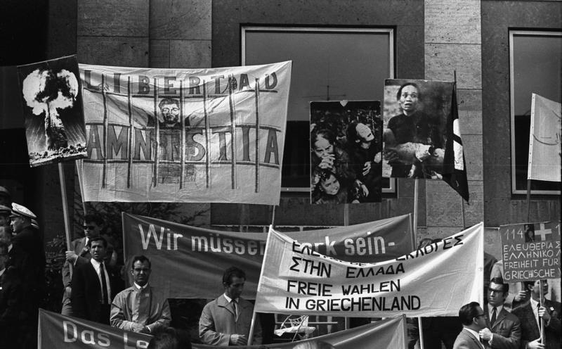 Stuttgart, Maikundgebung Zentralbild/bpb 1. Mai 1967 in Stuttgart Diese Transparente und Losungen gaben der Stuttgarter Maikundgebung das äußere Gepräge [Stuttgart.- Maikundgebung, Transparente gegen den Atomkrieg und für freie Wahlen in Griechenland.]